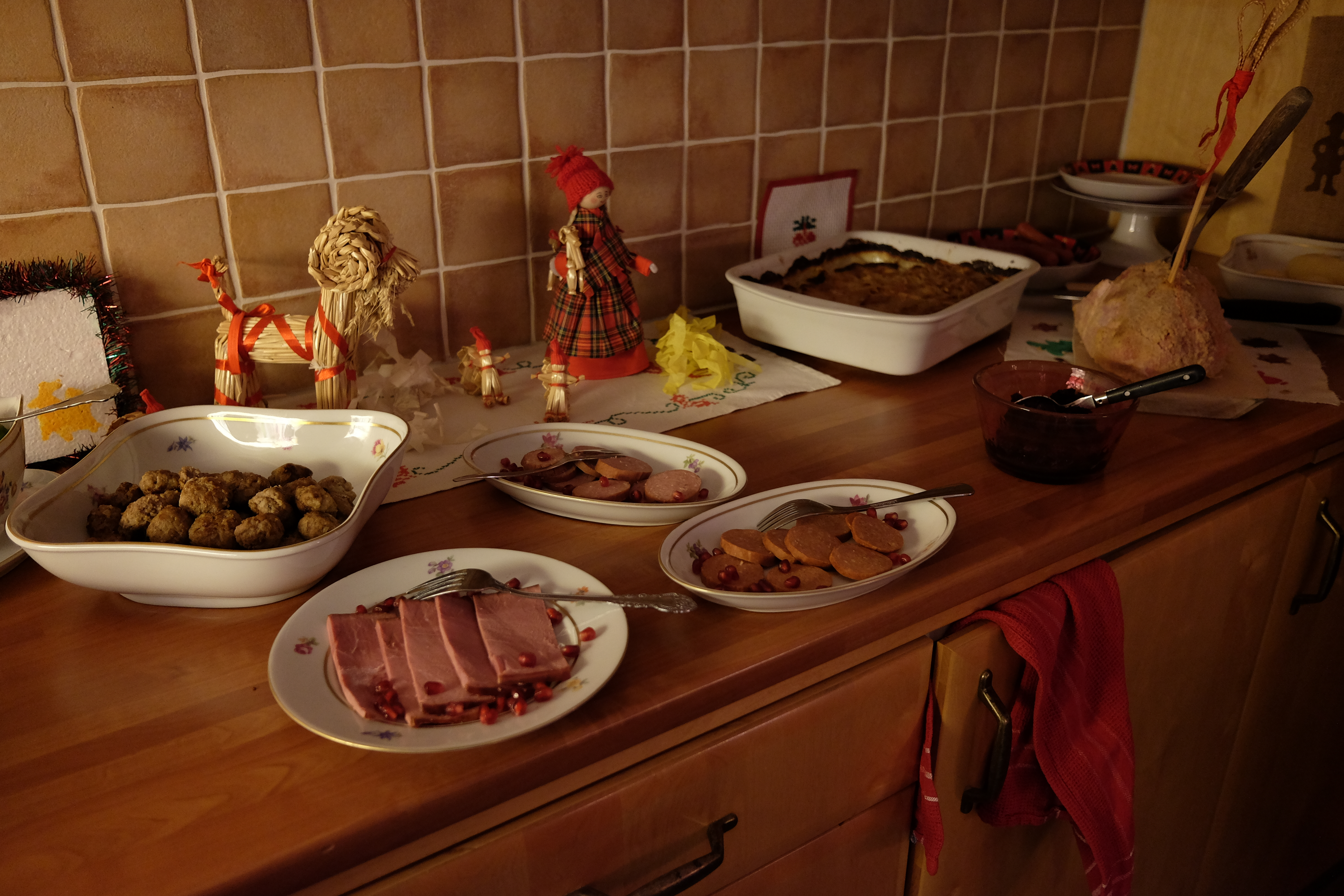 Julmat, julen 2017, Sverige.